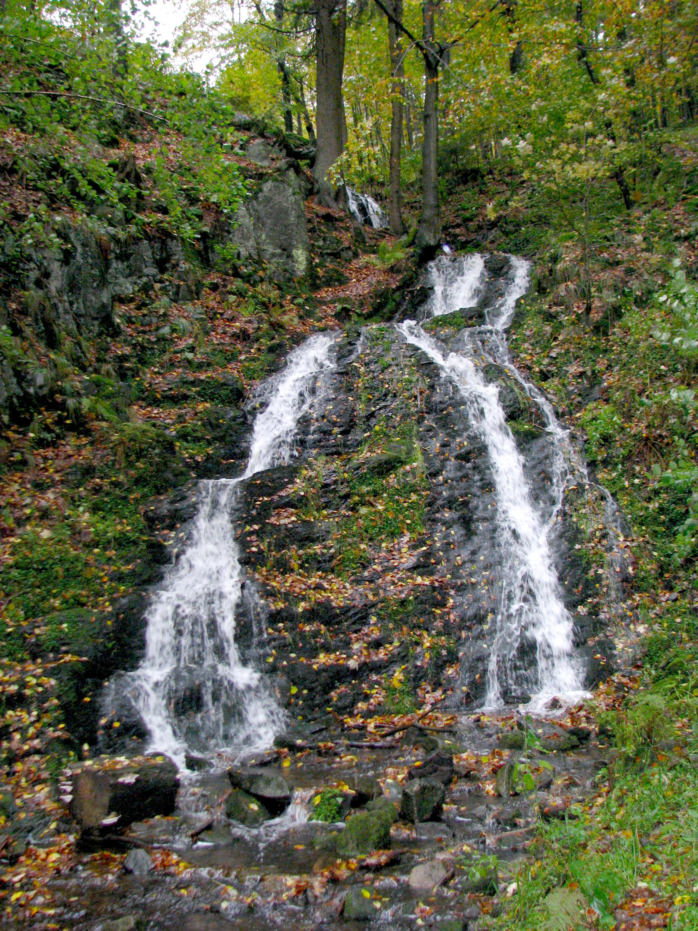 Der Spitterfall, ein in mehreren Kaskaden abstürzender Wasserfall der Spitter im Nordwesten des Thüringer Waldes.